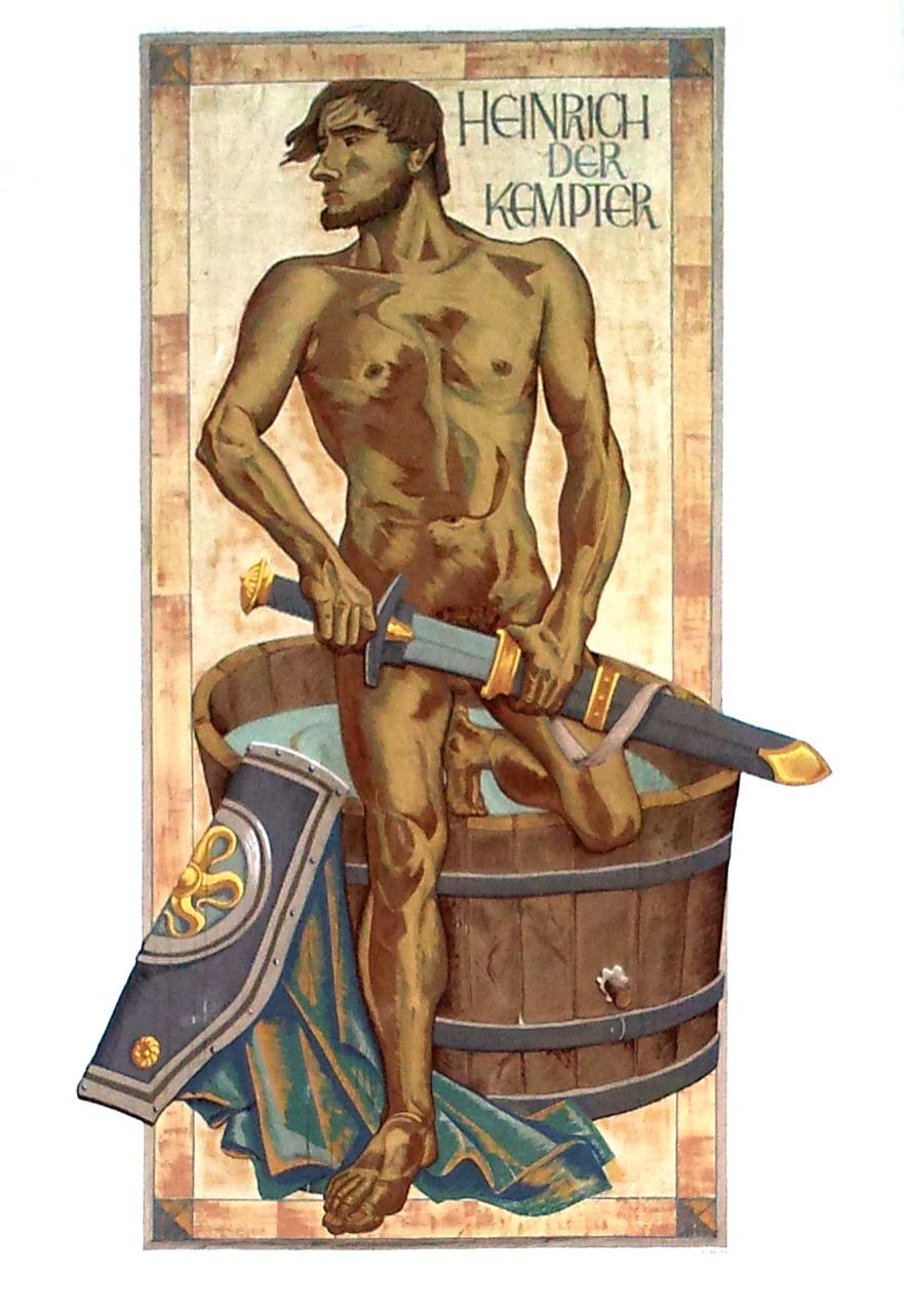 Wandmalerei (Heinrich von Kempten) an der Südfront des Kemptener Rathauses